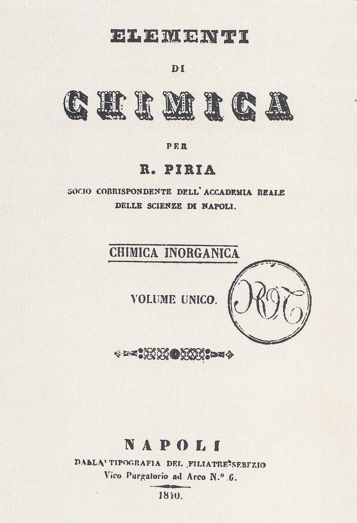 Frontseite des Buches Elementi di Chimica. 1840